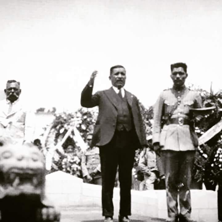 Jose Urban Aguirre